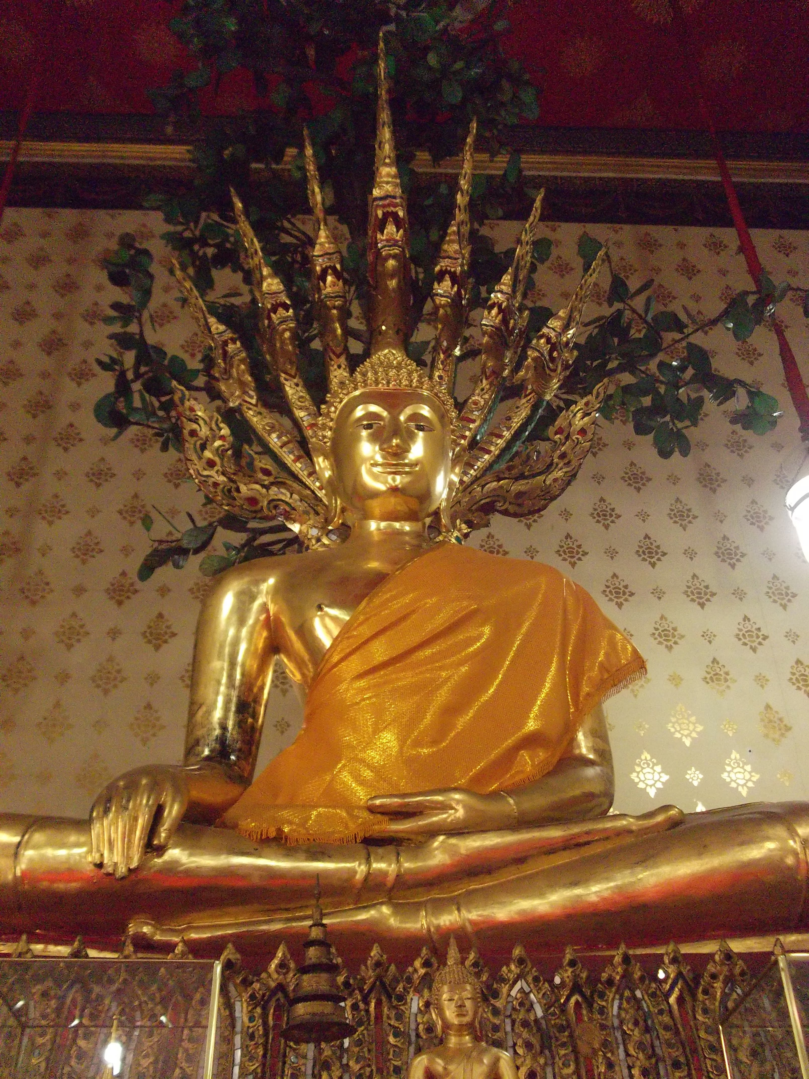 วัดเศวตฉัตร